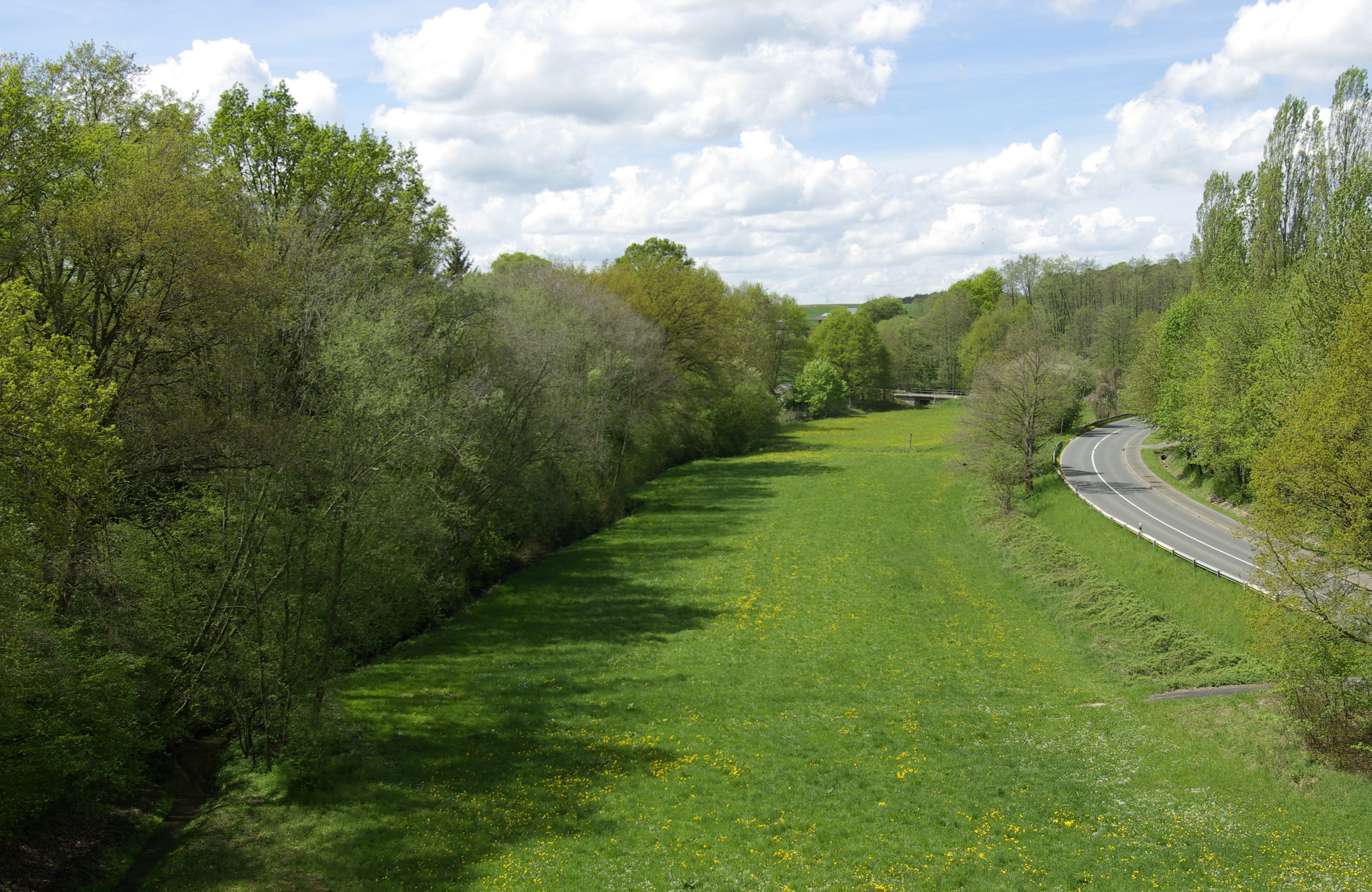 Blick von der Trogbrücke des Main-Donau-Kanals auf das Landschaftsschutzgebiet Michelbachtal im Fürther Ortsteil Vach.